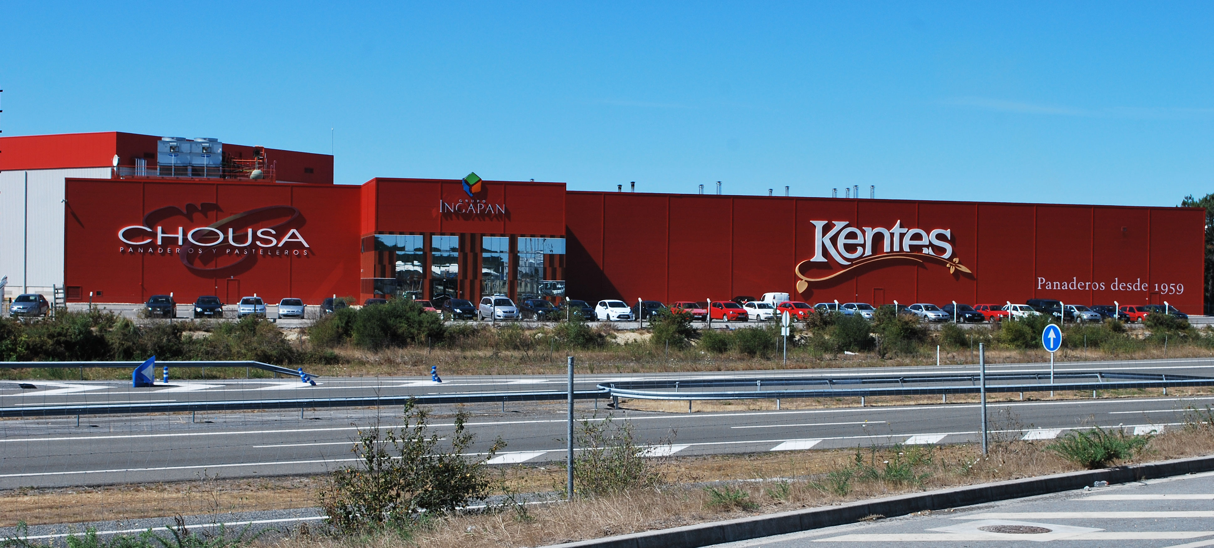 Vista de Ingapán Chousa en Outeiro de Rei, Lugo Galiza Spain